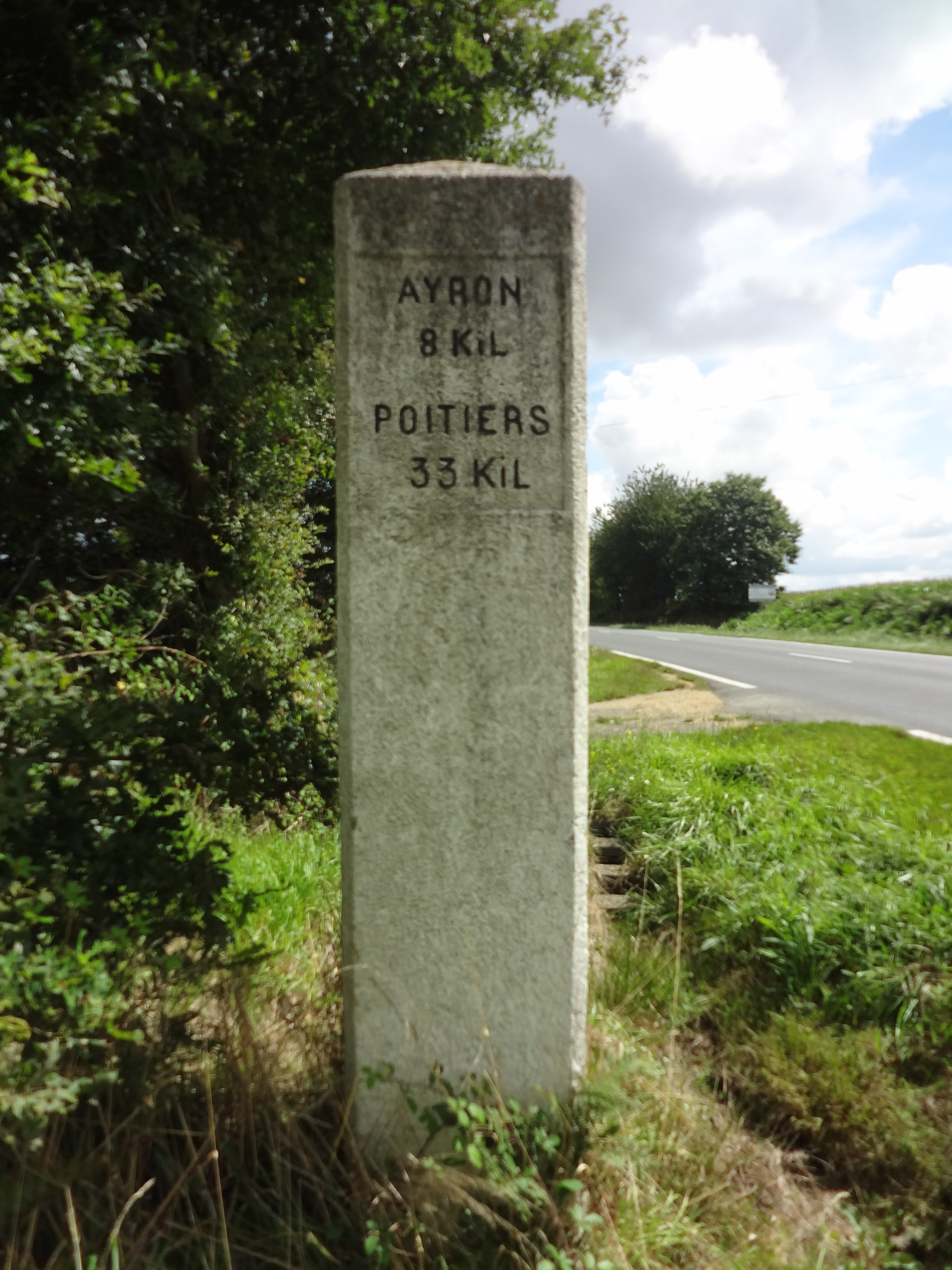 Borne située le long de la route nationale 149, France, à la frontière des départements des Deux-Sèvres et de la Vienne. Sur la face avant (sud), elle porte: une inscription aux caractères encrés : (dans un cadre) D[épartemen]t des 2 Sèvres/D[épartemen]t de la Vienne Route nationale 149 (originellement, 148 bis avec des parties non encrées quand la route a été renumérotée 149) de Poitiers à Nantes un médaillon du nivellement général portant l'altitude 169m15 (photo). Sur la face ouest : Parthenay 17 km Nantes 136 km Sur la face est (photo) : Ayron 8 kil